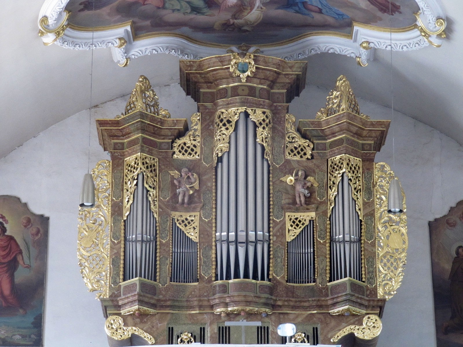 Hauptorgel der Kirche St.Michael (Rohrbergkirche), in Hengersberg